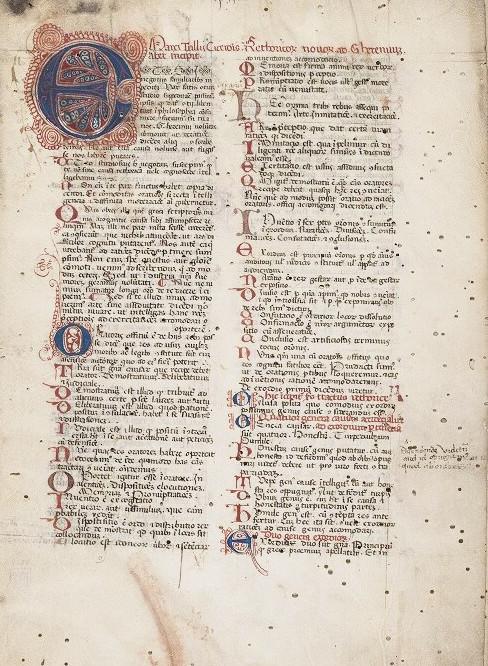 Początek Rhetorica ad Herennium z glossami czytelników. Rękopis spisany w latach 1350-1400.